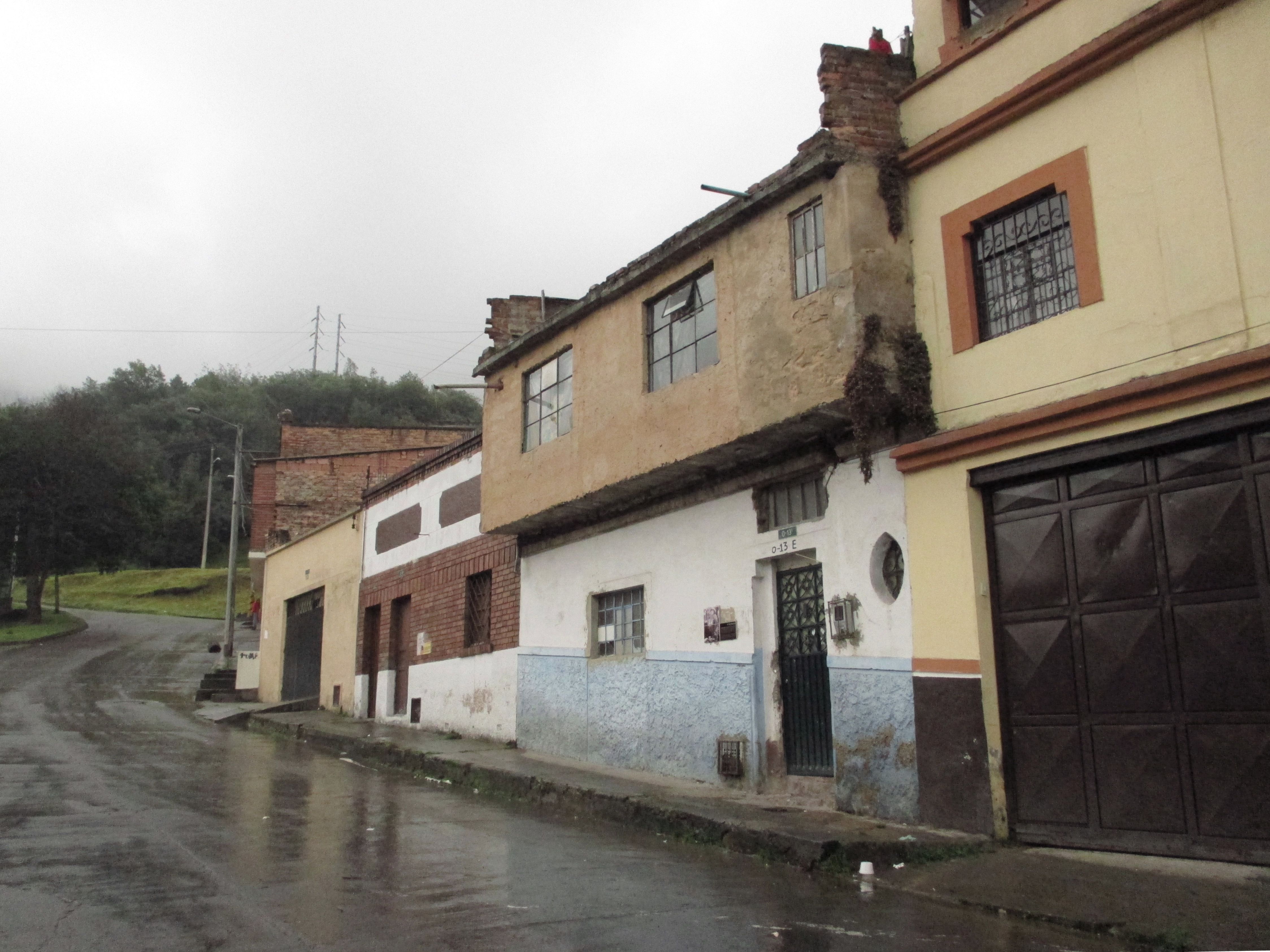 Colombia, casas en el barrio La Perseverancia, en lo cerros orientales de Bogotá.